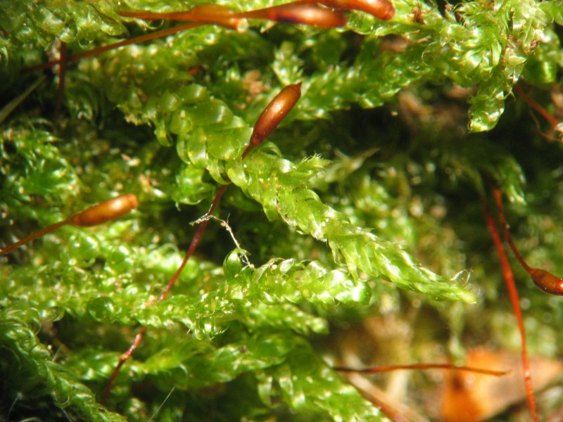 Zypressen-Schlafmoos Hypnum cupressiforme, Müritz-Gebiet